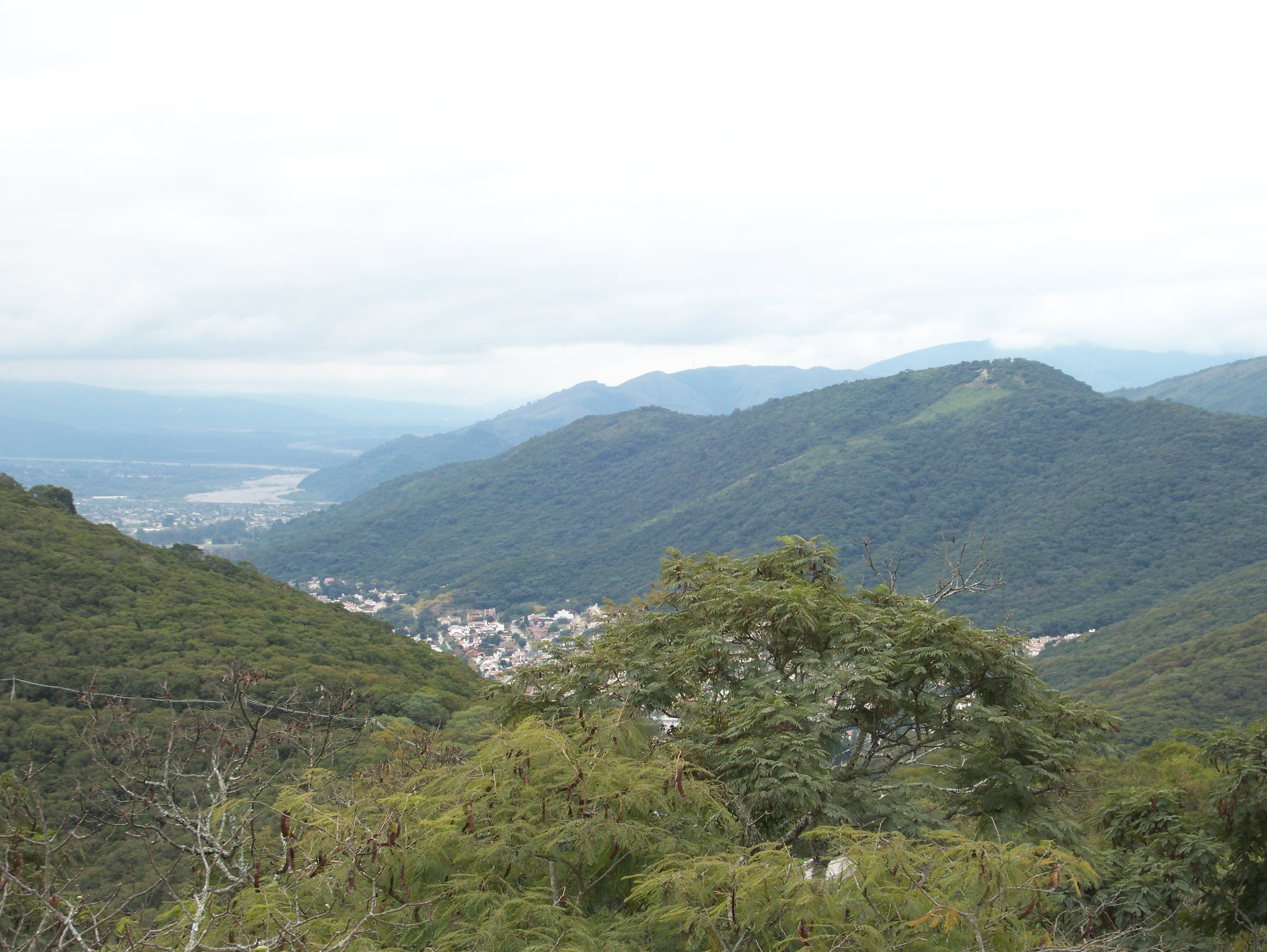 Paisaje característico de las laderas del Valle de Lerma, en carcanias a la ciudad de Salta